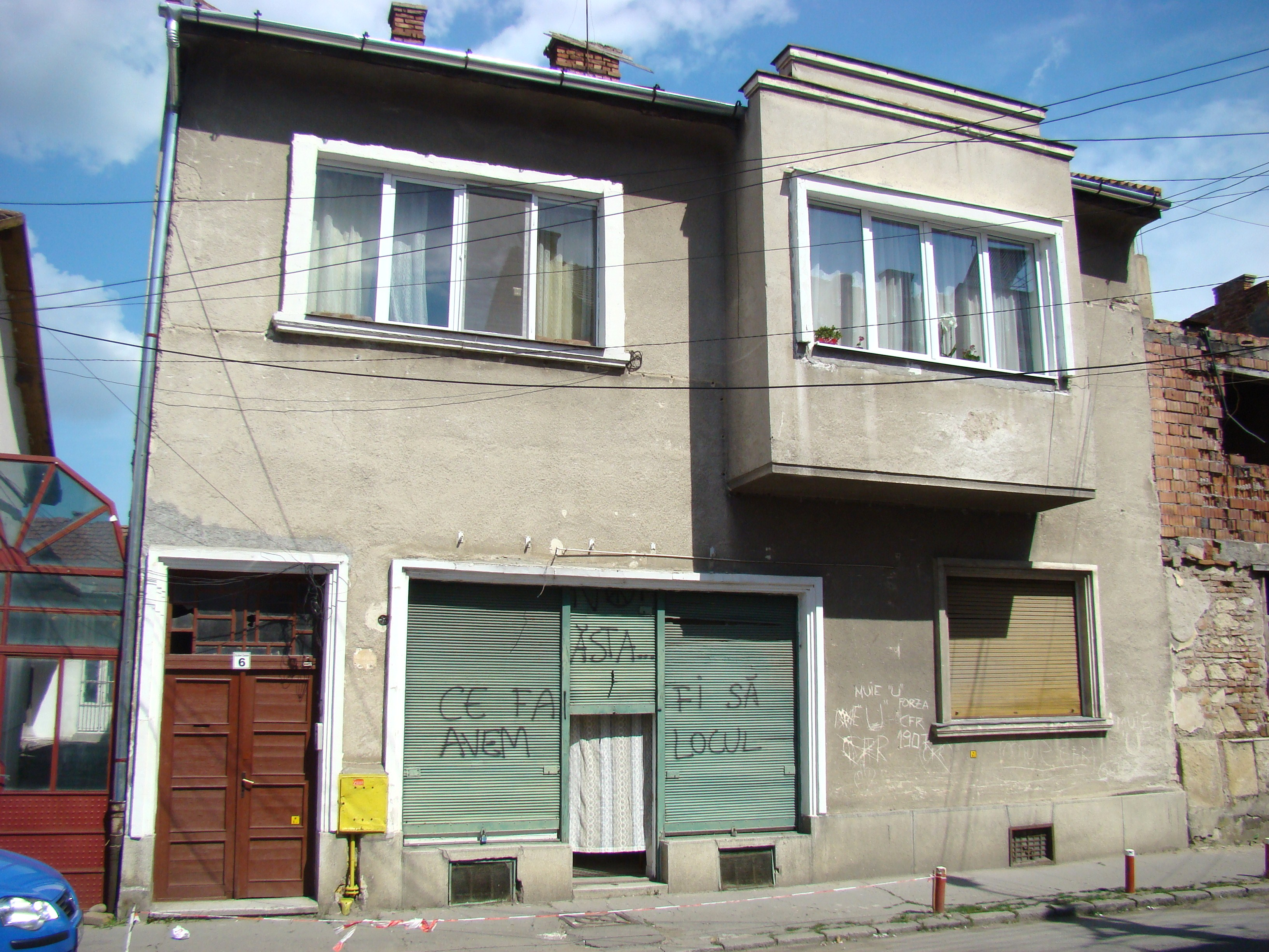 Clădire monument istoric, str.Albert Einstein, nr.6 (Sediul cenaclului literar Victor Papilian)